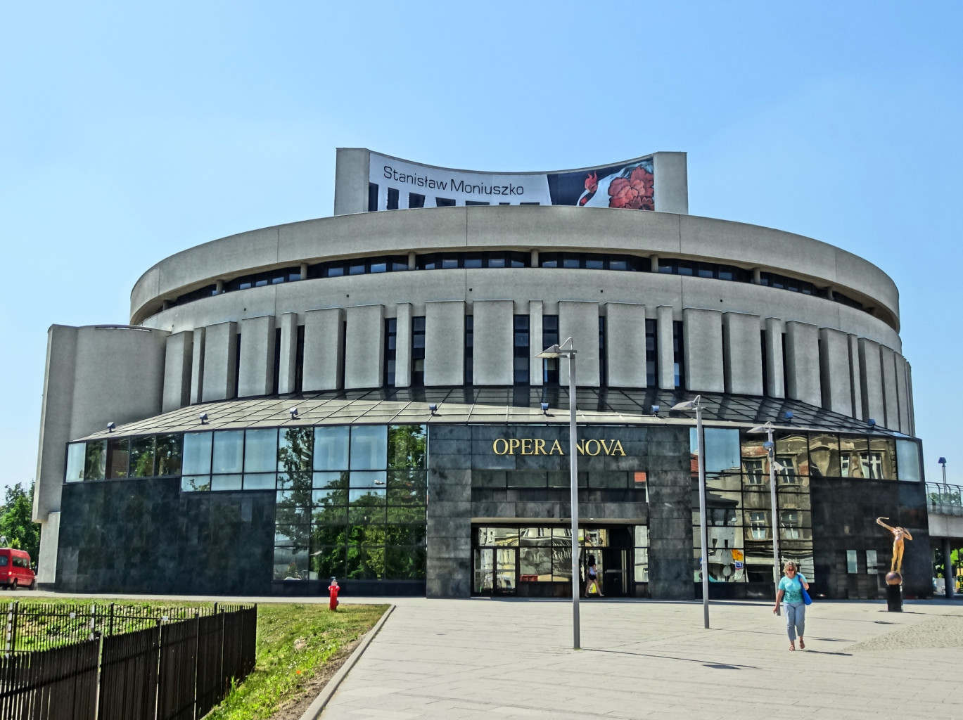 Budynek Opery Nova, zbud. w latach 1973-2006 w Bydgoszczy, ul. Ferdynanda Focha 5